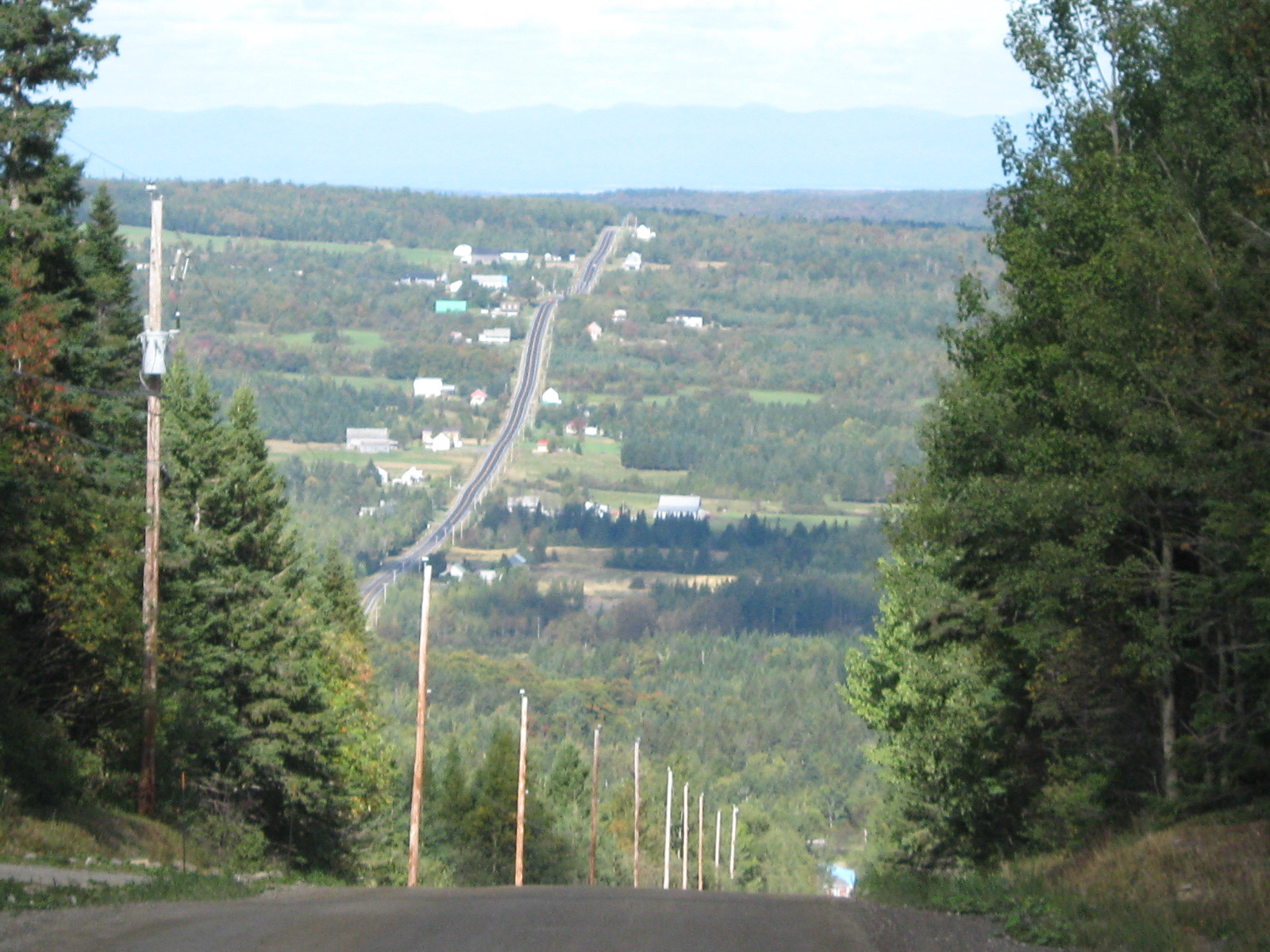 Paysage de Notre-Dame-Auxiliatrice-de-Buckland à partir de la route Saint-Louis, la route asphaltée au loin est la route 279 vers Saint-Damien-de-Buckland.